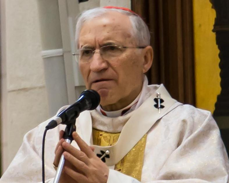 Parte de una fotografía hecha al cardenal Rouco durante un oficio en la catedral de Madrid